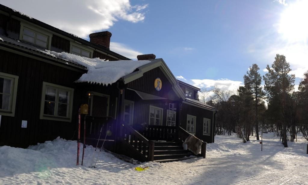 Huvudbyggnad på Saltoluokta Fjällstation